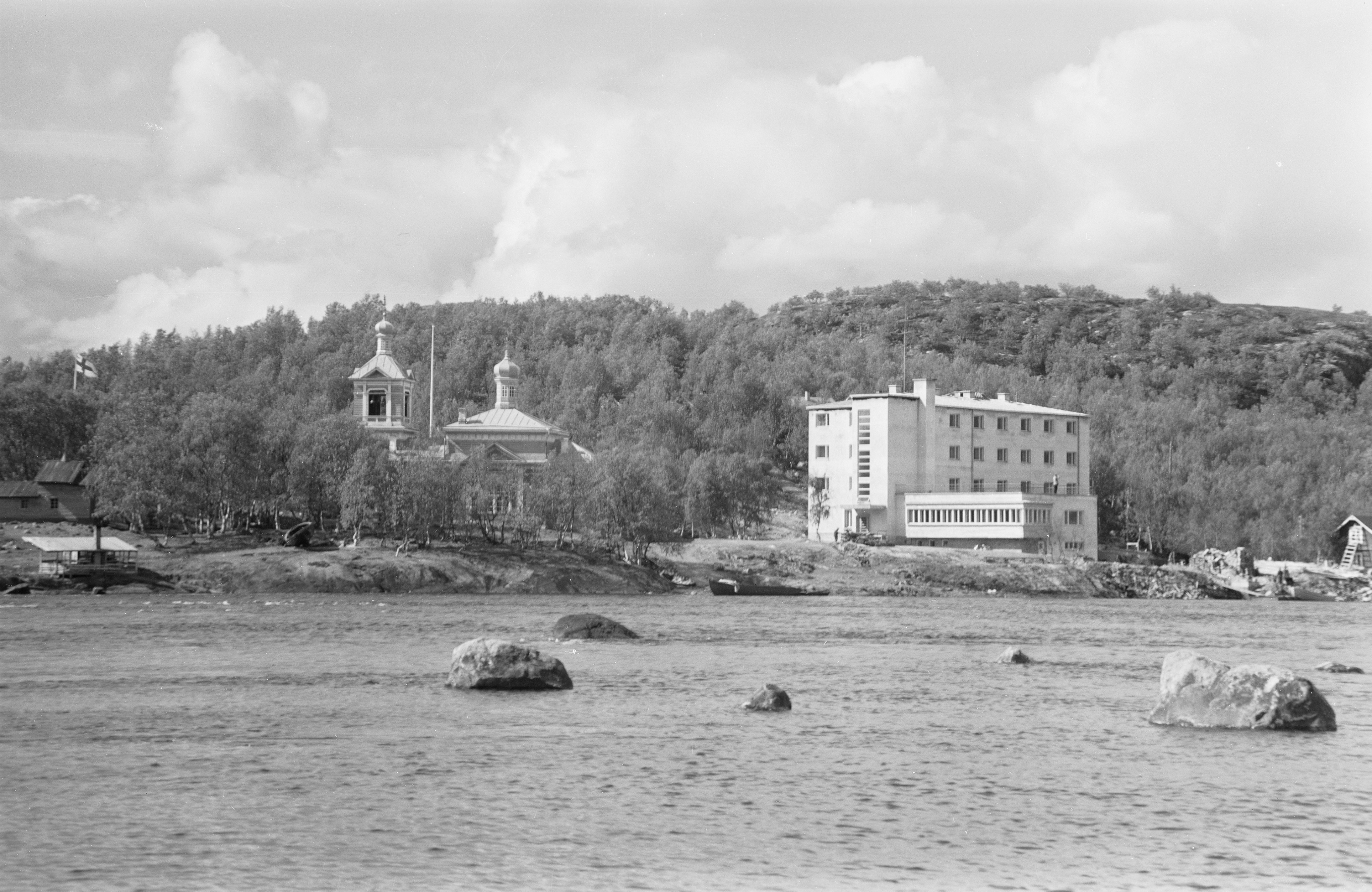 Kolttakönkään matkailijahotelli ja ortodoksinen kirkko Paatsjoelta päin nähtynä.